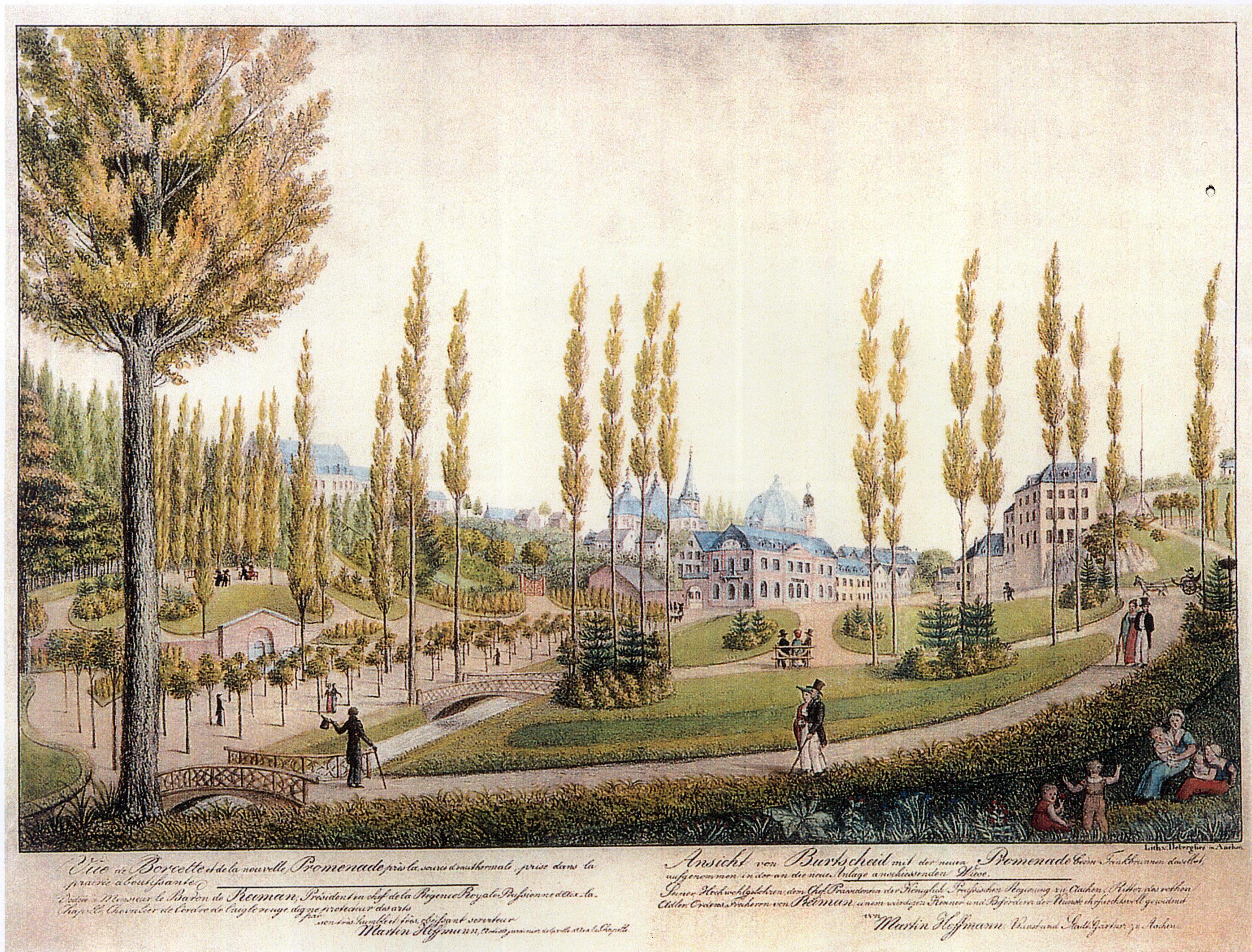 Ansicht des Burtscheider Kurgartens mit dem Trinkbrunnen, später als Victoriabrunnen umgebaut